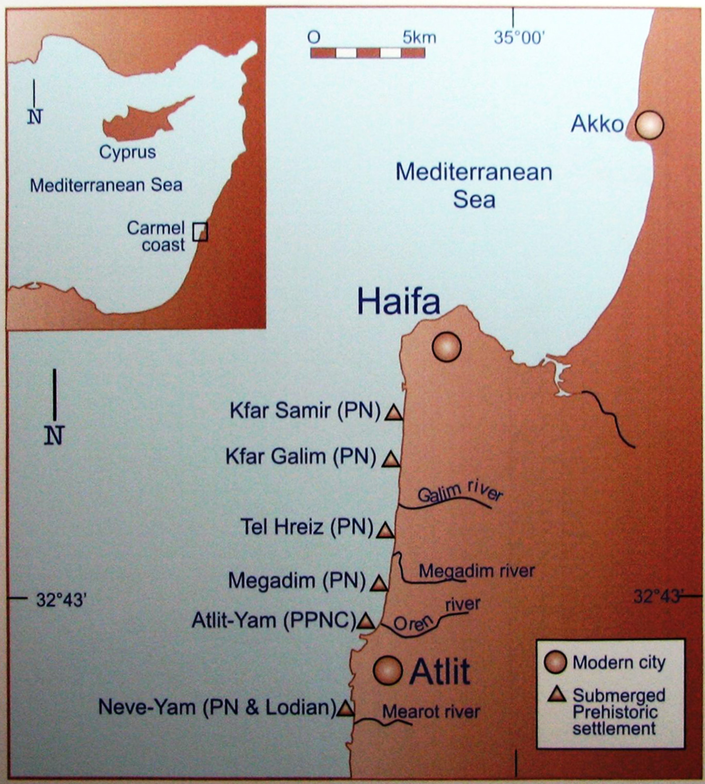 Atlit Yam is an ancient submerged Neolithic village off the coast of Atlit, Israel. The site is dated to the final Pre-Pottery Neolithic B site of Atlit Yam dates between 6900 and 6300 BC. Moshe Stekelis Museum of Prehistory exhibition in Haifa Israel The exhibition is based on the excavations and researches of the Haifa University and Antiquities Authority. Photography by Yosef Galili, Ehud Galili, Itamar Greenberg הכפר הניאוליתי בעתלית-ים שוכן בתוך הים במרחק 400 מטר מקו החוף, מערבית לשפך נחל אורן בעורפו של רכס כורכר טבוע שבהמשכו דרומה נמצא מבצר עתלית הצלבני. האתר נמצא בעומק של 12-8 מטר מתחת לפני הים. האתר מתוארך לסוף התקופה הנאוליתית קדם קרמית ב סוף האלף ה-6 לפנה"ס ממצאים מהאתר מוצגים במוזיאון לפרהיסטוריה ע"ש משה שטקליס בחיפה הנמצא בתוך גן החיות במרכז הכרמל התערוכה מבוססת על חפירות ומחקרים שהתבצעו על ידי אוניברסיטת חיפה ורשות העתיקות הצילומים מהחפירות המוצגים בתערוכה צולמו על ידי יוסקה גלילי, אהוד גלילי ואיתמר גרינברג מפת מיקום האתרים הפרהיסטוריים המוצפים בחוף הכרמל